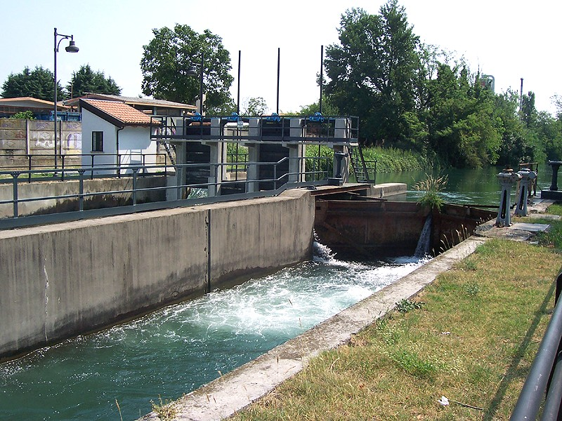 Inzago - Chiuse del Naviglio Martesana